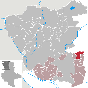 (Original text: Lindstedt im Landkreis Salzwedel)